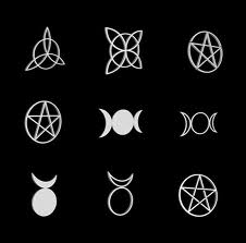 son simbolos estraordinarios